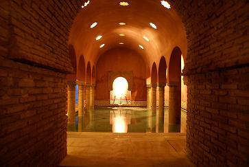 La sala templada de los Hammam Granada, antiguos banos arabes (ahora restaurados y privatizados), en el Albaicin bajo